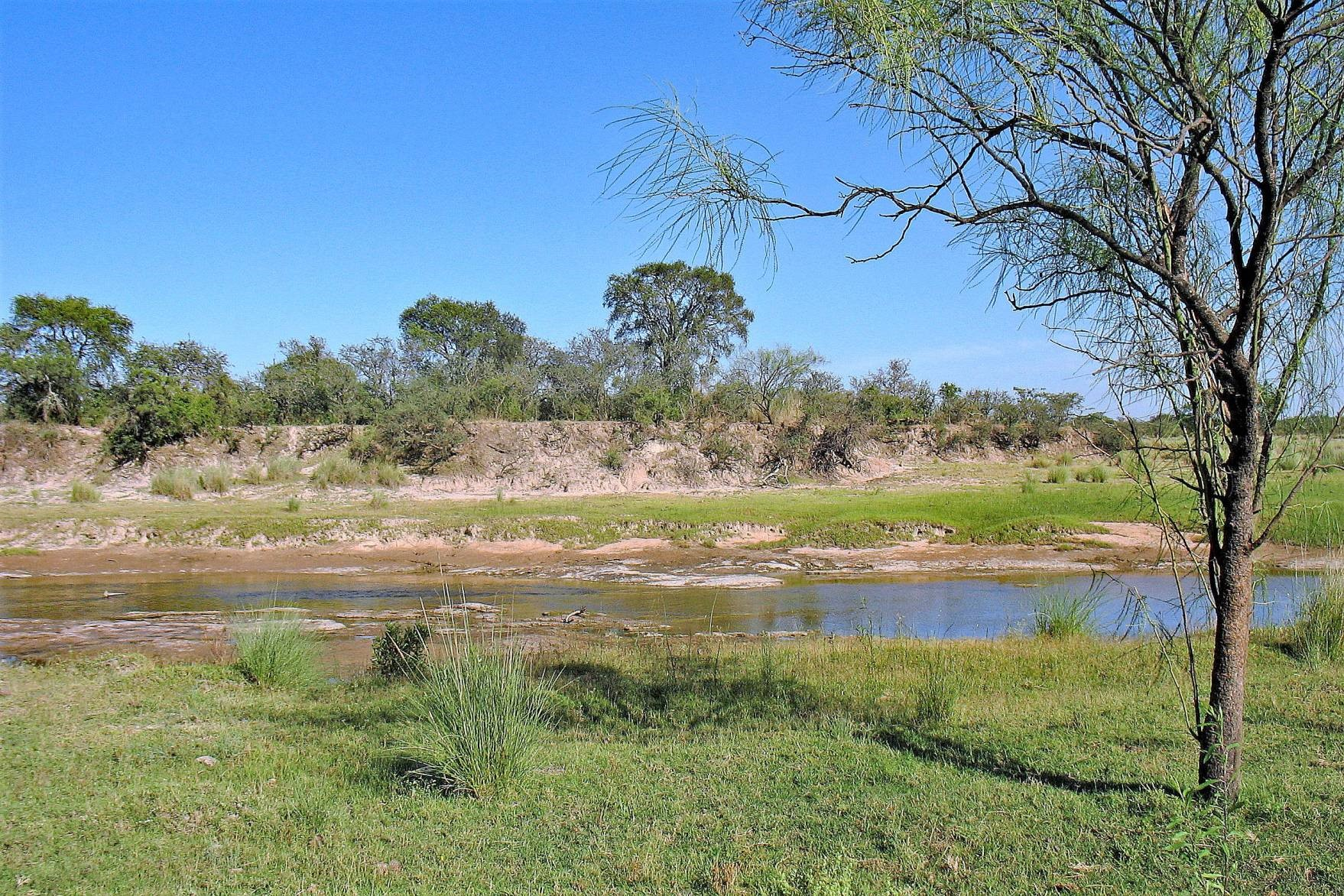 Descripción paisajística de la zona rural de Progreso (Santa Fe)